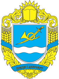 Герб Онуфріївського району Кіровоградської області